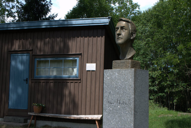 Kåre Holts dikterstue på Reidvintunet i Hillestad, Holmestrand